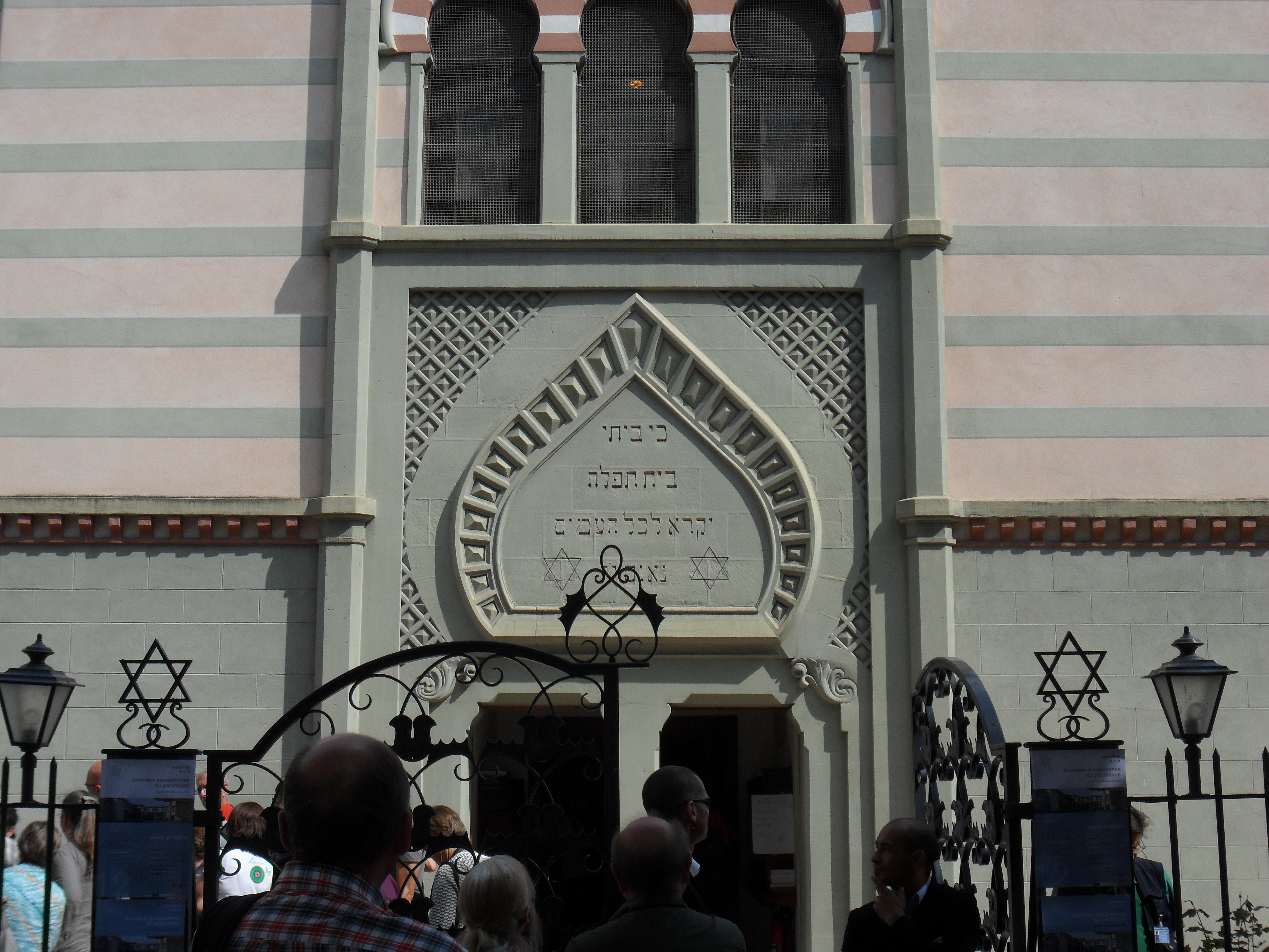 Tympan de la synagogue Beth Yaacov devant le portail